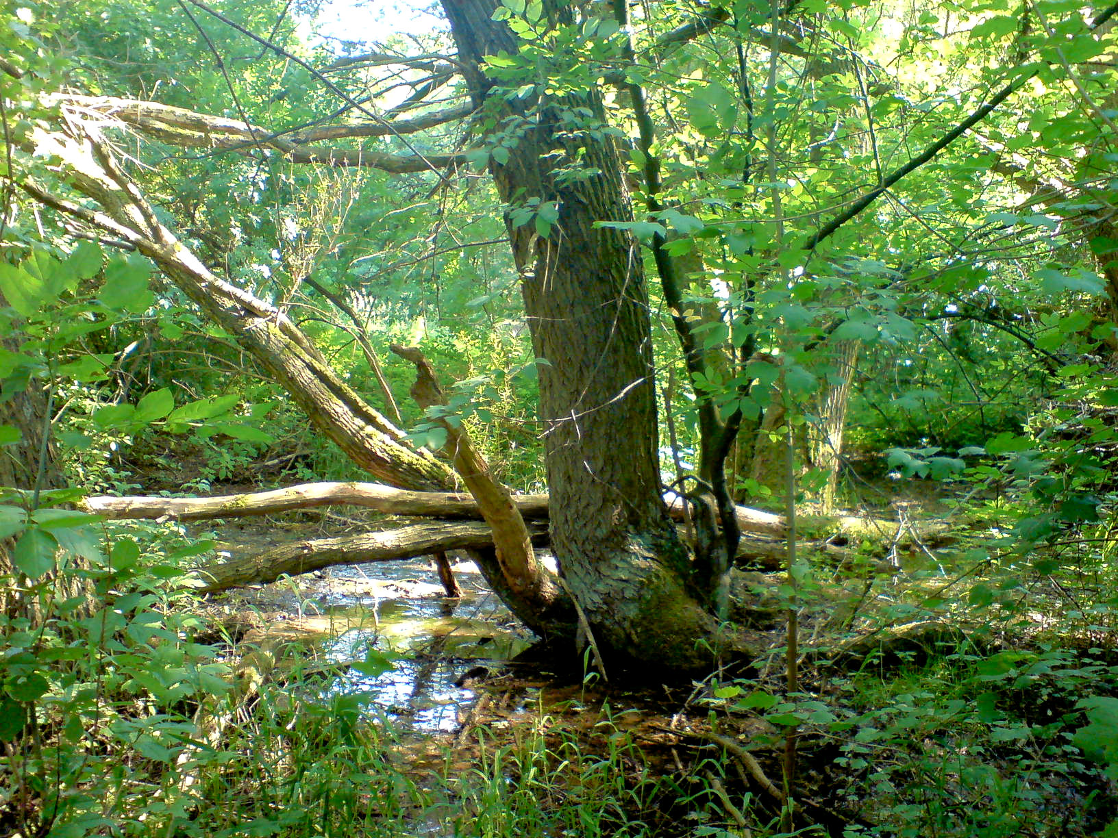 Ein winziges Stück Auwald an der Lutter auf dem Gelände der Nord-Uni.